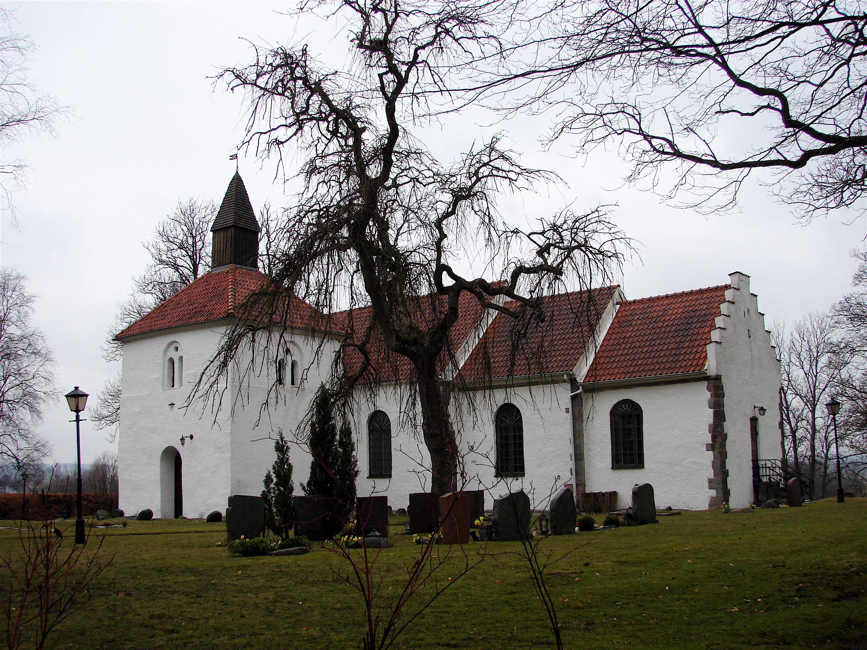 Stehag church Scania